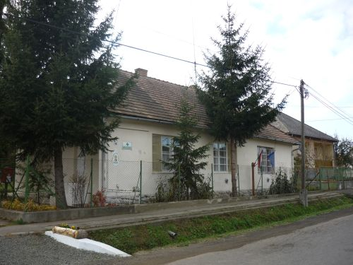 A polgármesteri hivatal Községháza. Cím: Nógrád megye, Terény, Arany János út 46